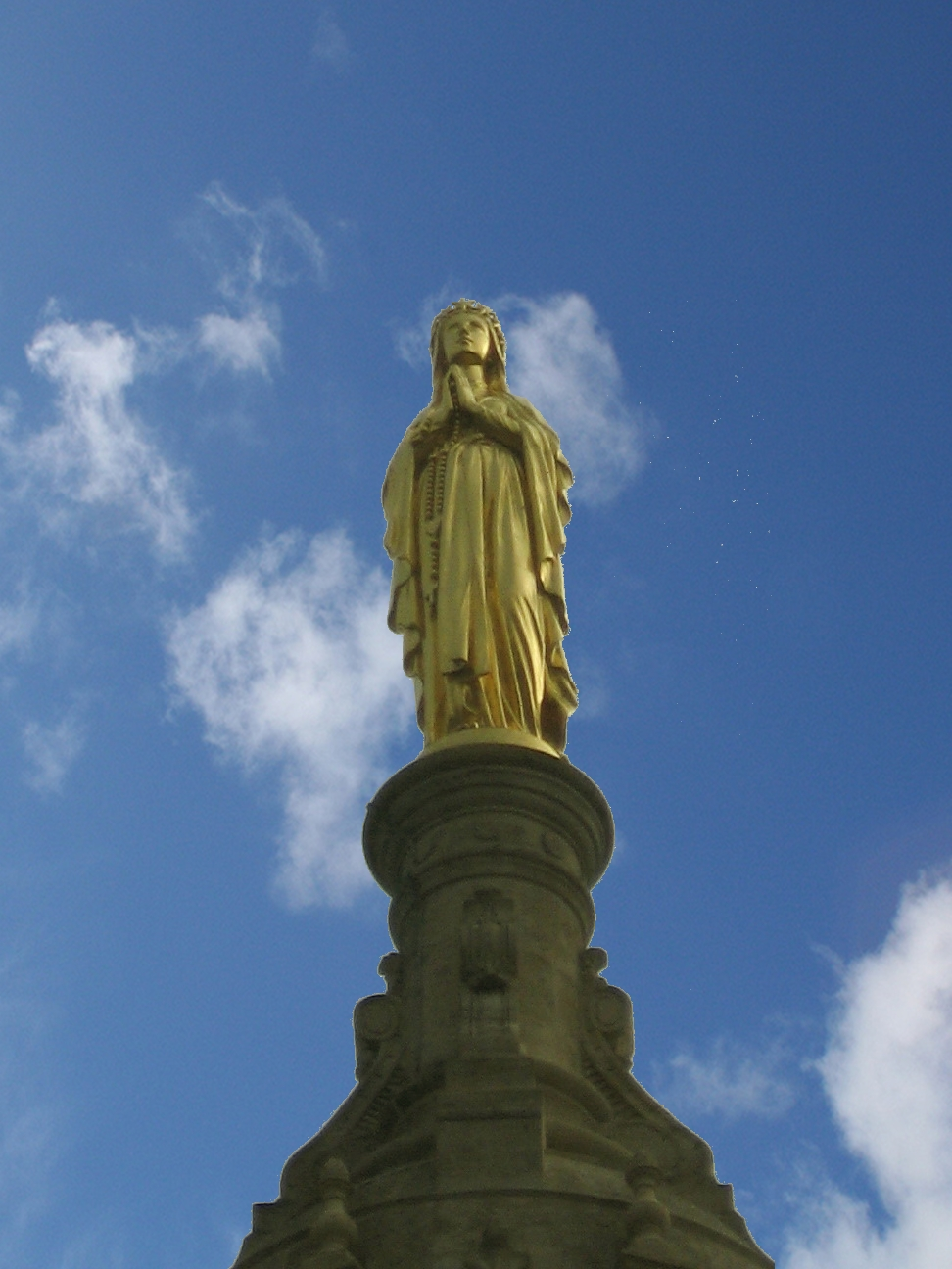 Statue du clocher de Notre-Dame de Verdelais, Gironde, Aquitaine, France